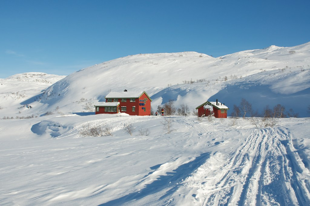 Stavanger Turistforenings Taumevatnhytta ved Taumevatn